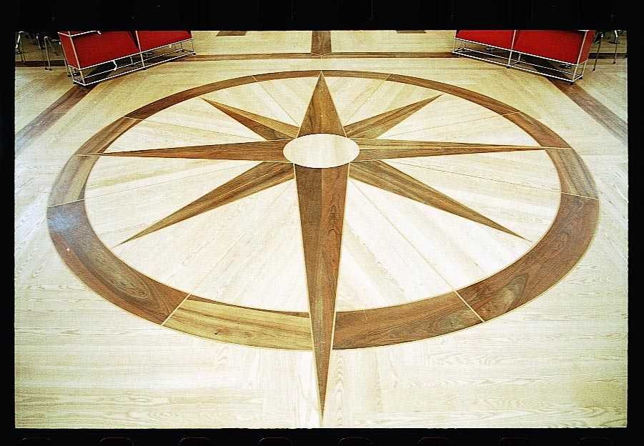 Bibliothèque d'Etude et du Patrimoine, Toulouse.